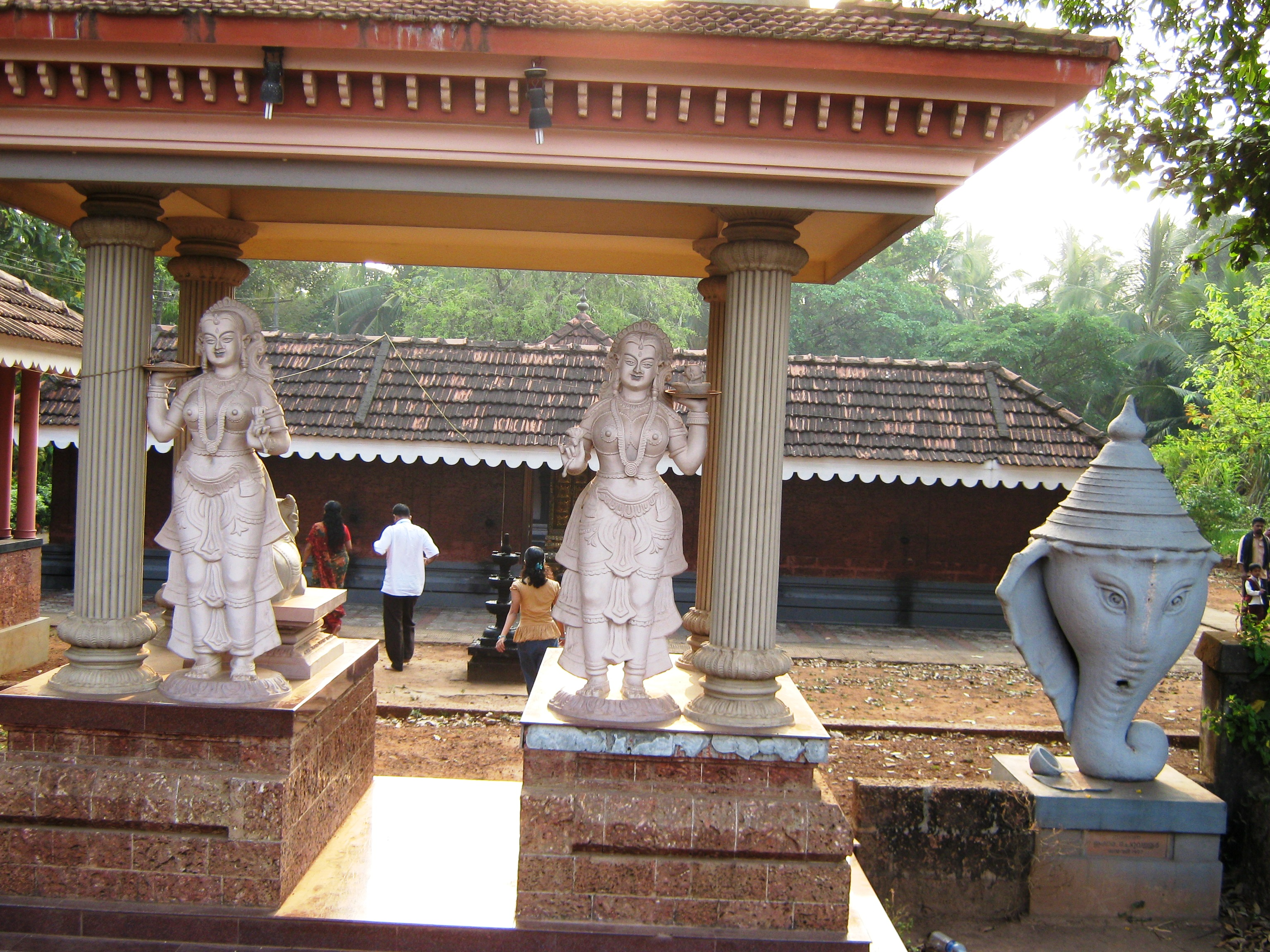 Payyannur, Kerala, India.